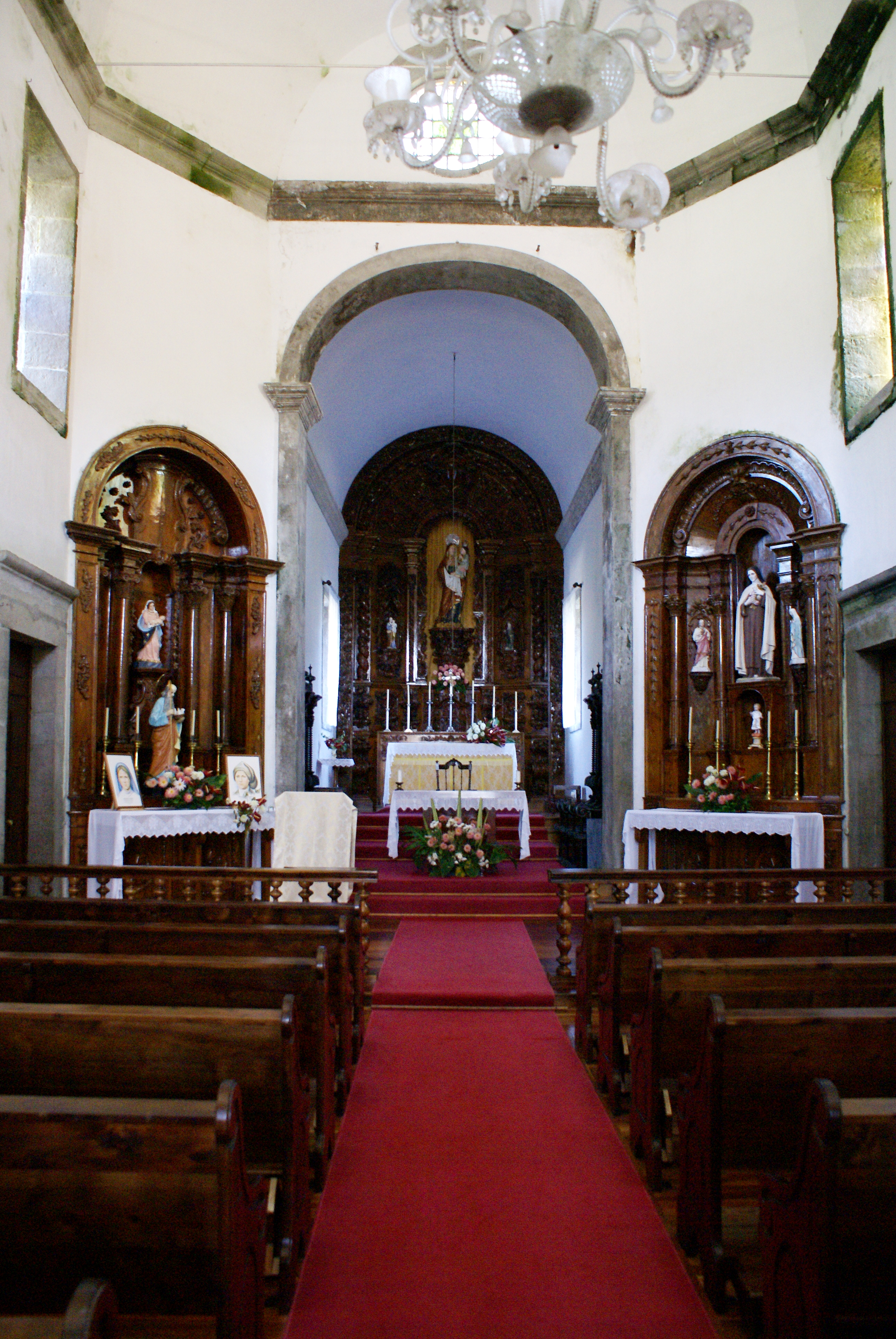 Central nave and alter in the Church of Nossa Senhora da Alegria, Furnas, Povoação, São Miguel (Azores), Portugal